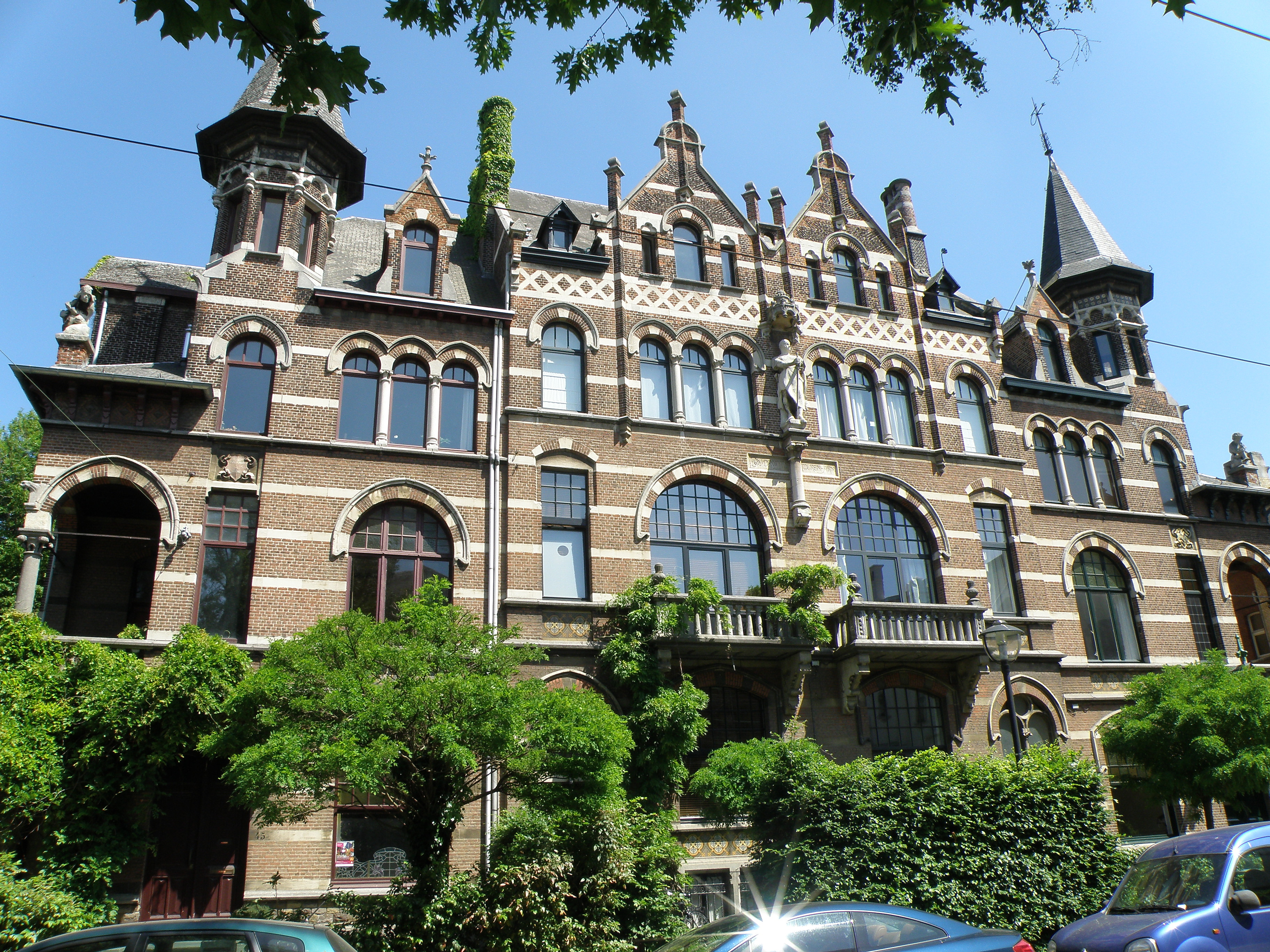 Anvers, Belgique. Ensemble de quatre maisons contiguës, de style néo-Renaissance flamande, dénommé Boudewijn IJzeren-Arm (Baudouin Bras-de-Fer, normalement Boudewijn met de IJzeren Arm), sis aux n° 45-51 de la Cogels-Osylei, dans le quartier Zurenborg. Œuvre de l’architecte Frans Van Dijk (1899).